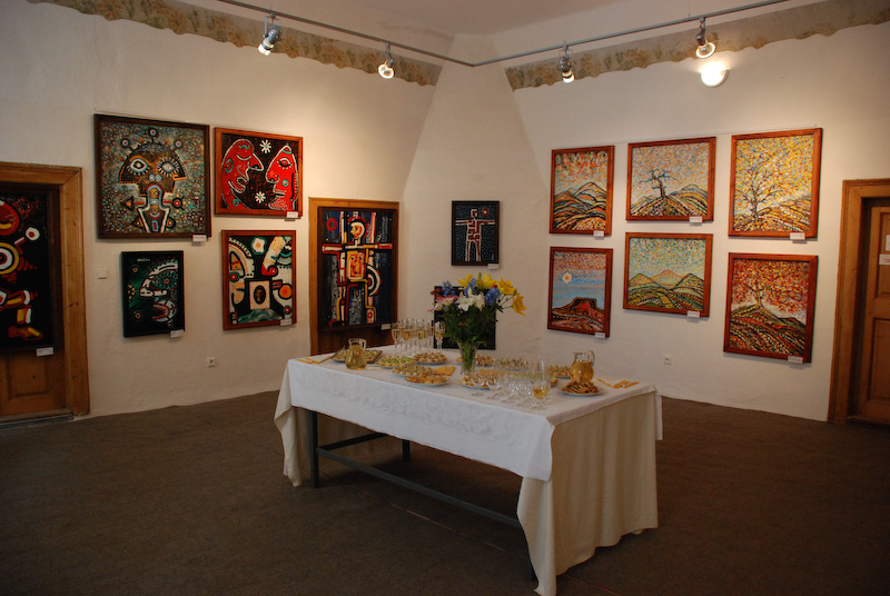 Interiér fary při výstavě obrazů pana Blažíčka